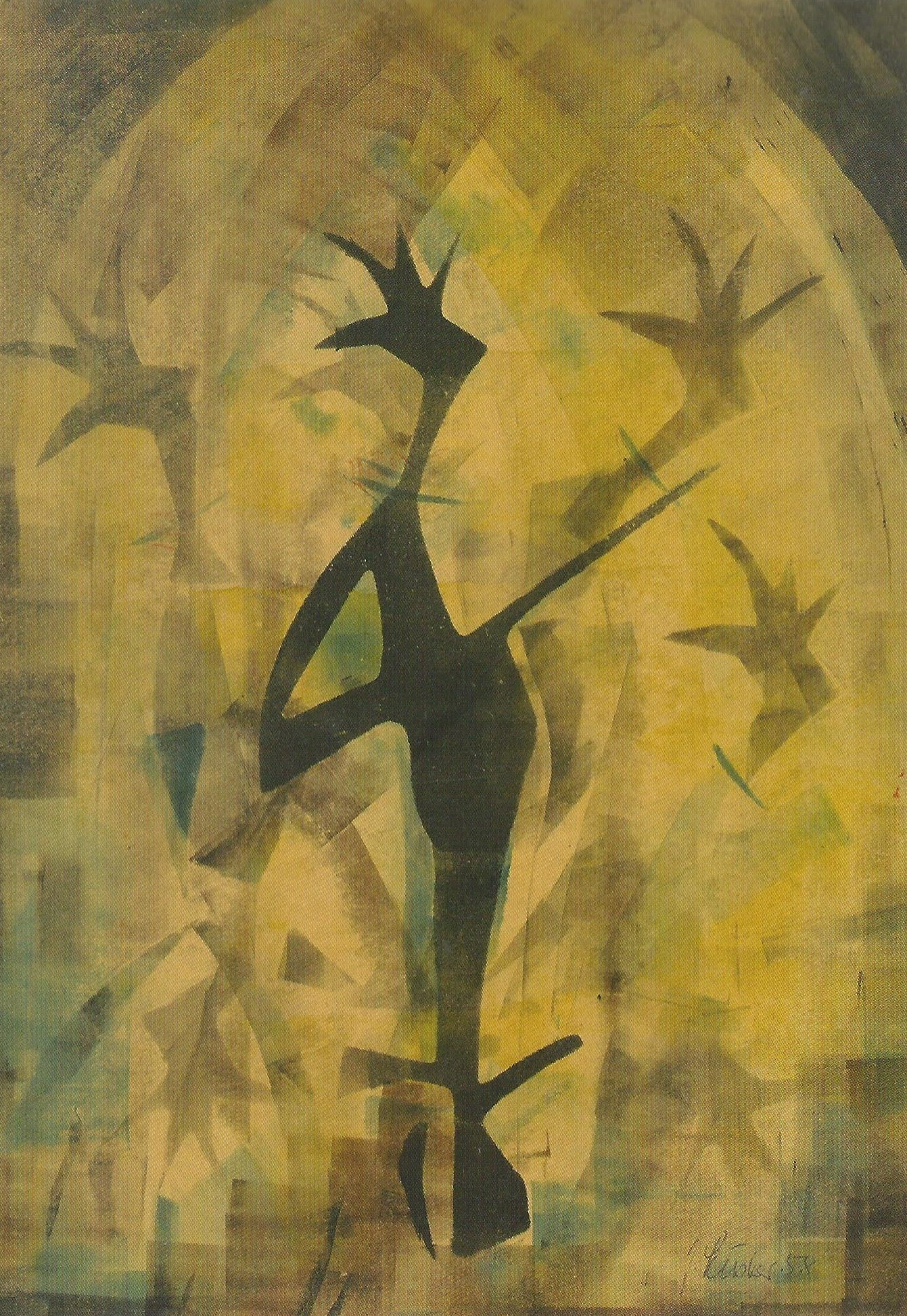 Verschneites Mahnmal aus Mooreiche „Displaced persons“ von Jochen Kusber, Rastede